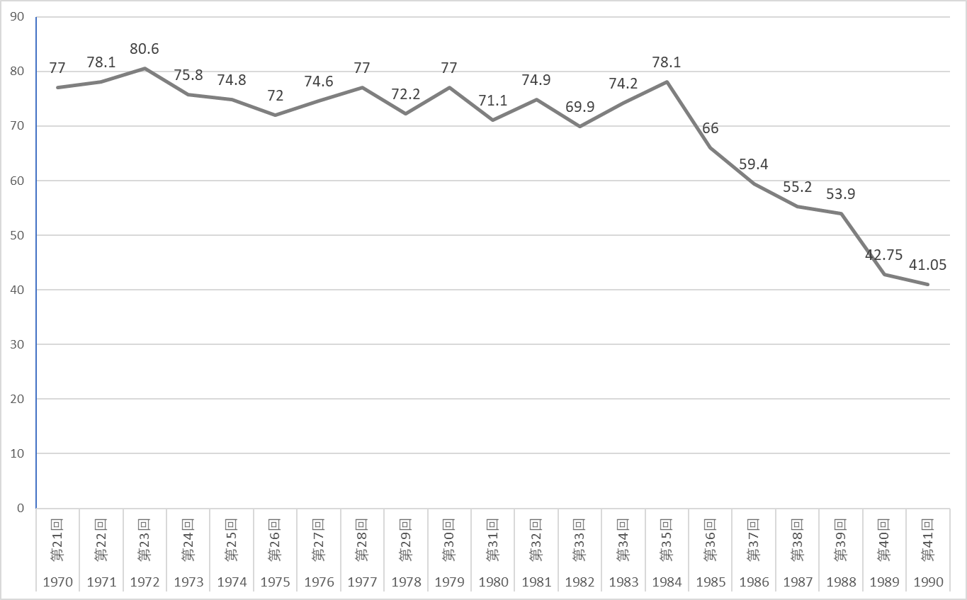 本图片是1970-1990年NHK红白歌合战的收视率走势图。数据来源于Video Research。第1989、1990年的数据为节目一、二两部数据的平均值。